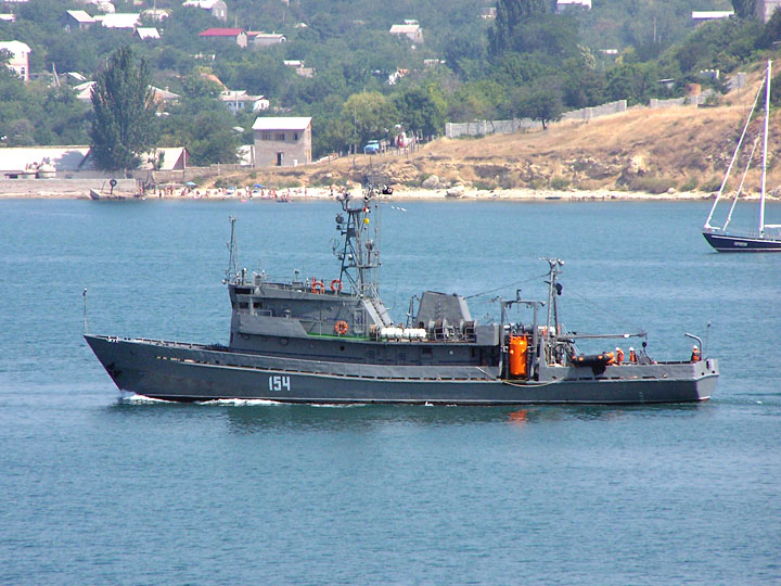 Водолазное морское судно "ВМ-154". Проект 535. Севастополь. Черноморский флот РФ.